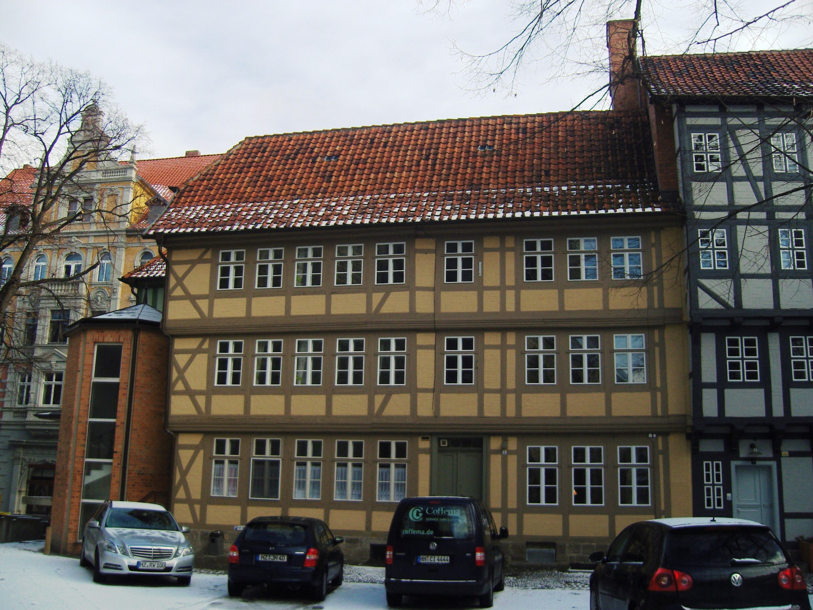 Denkmalgeschütztes Fachwerkgebäude in Quedlinburg; Marktkirchhof 2